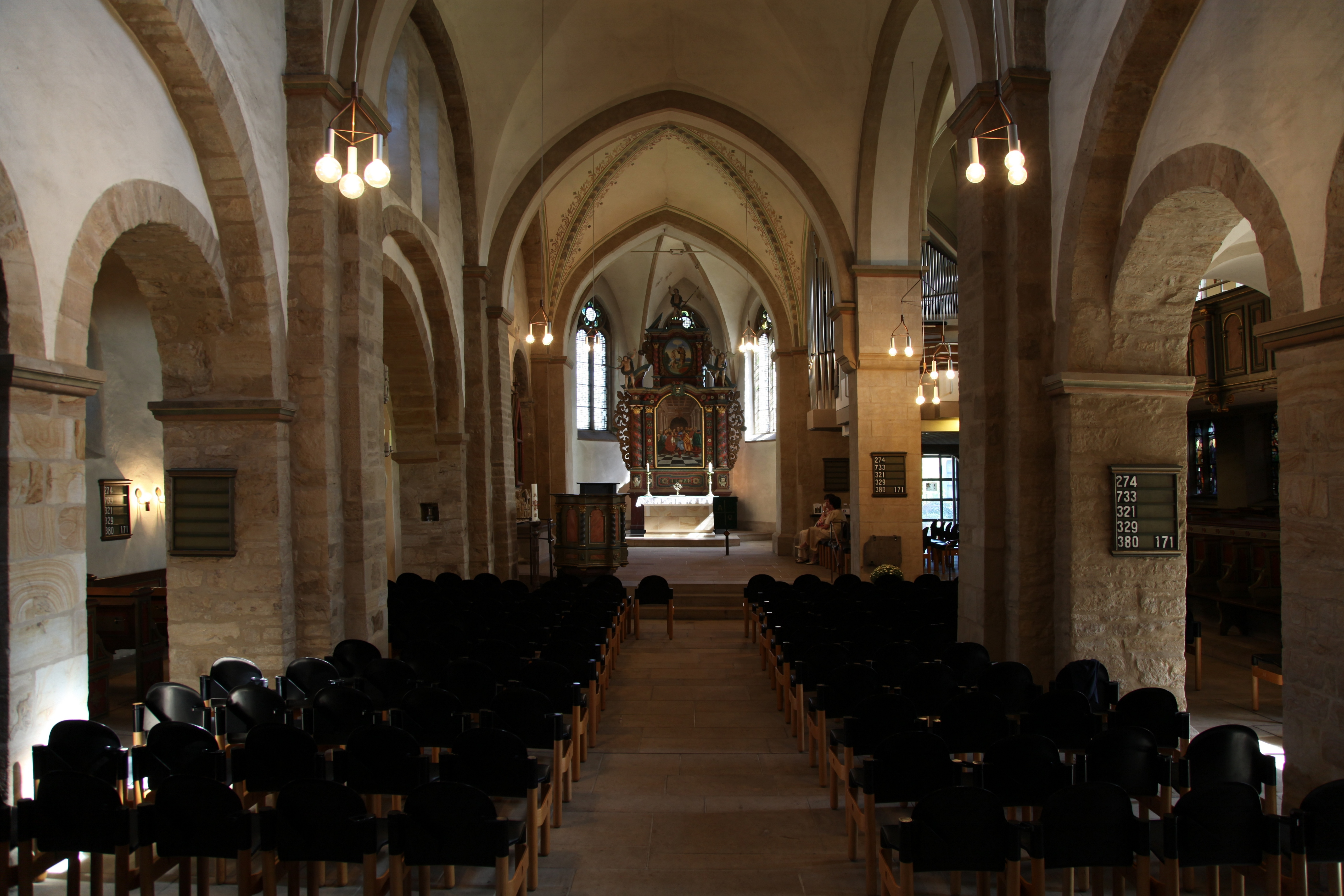 St. Vinzentius, Kattenstraße in Bochum-Harpen